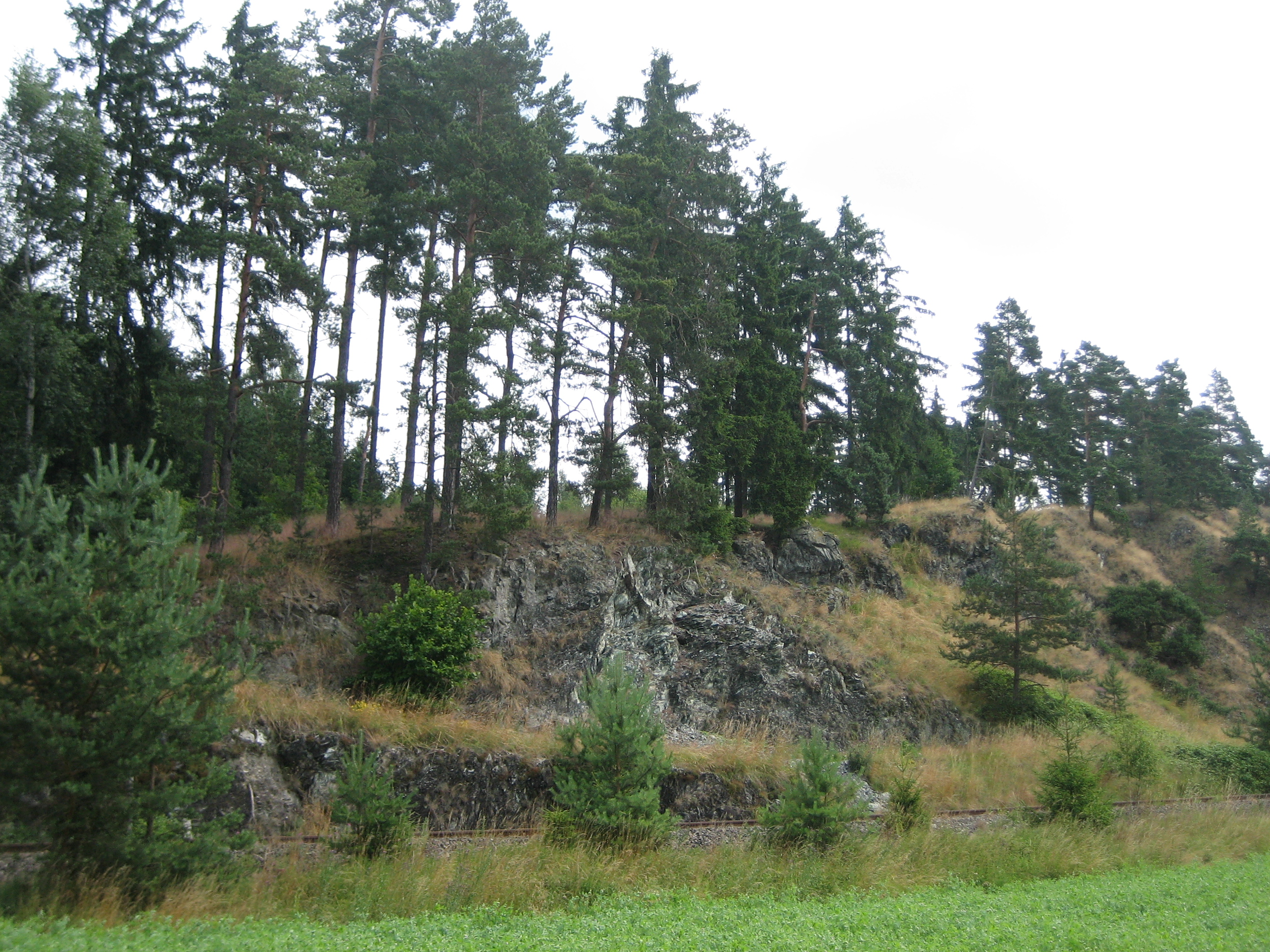 Wojaleite bei Rehau